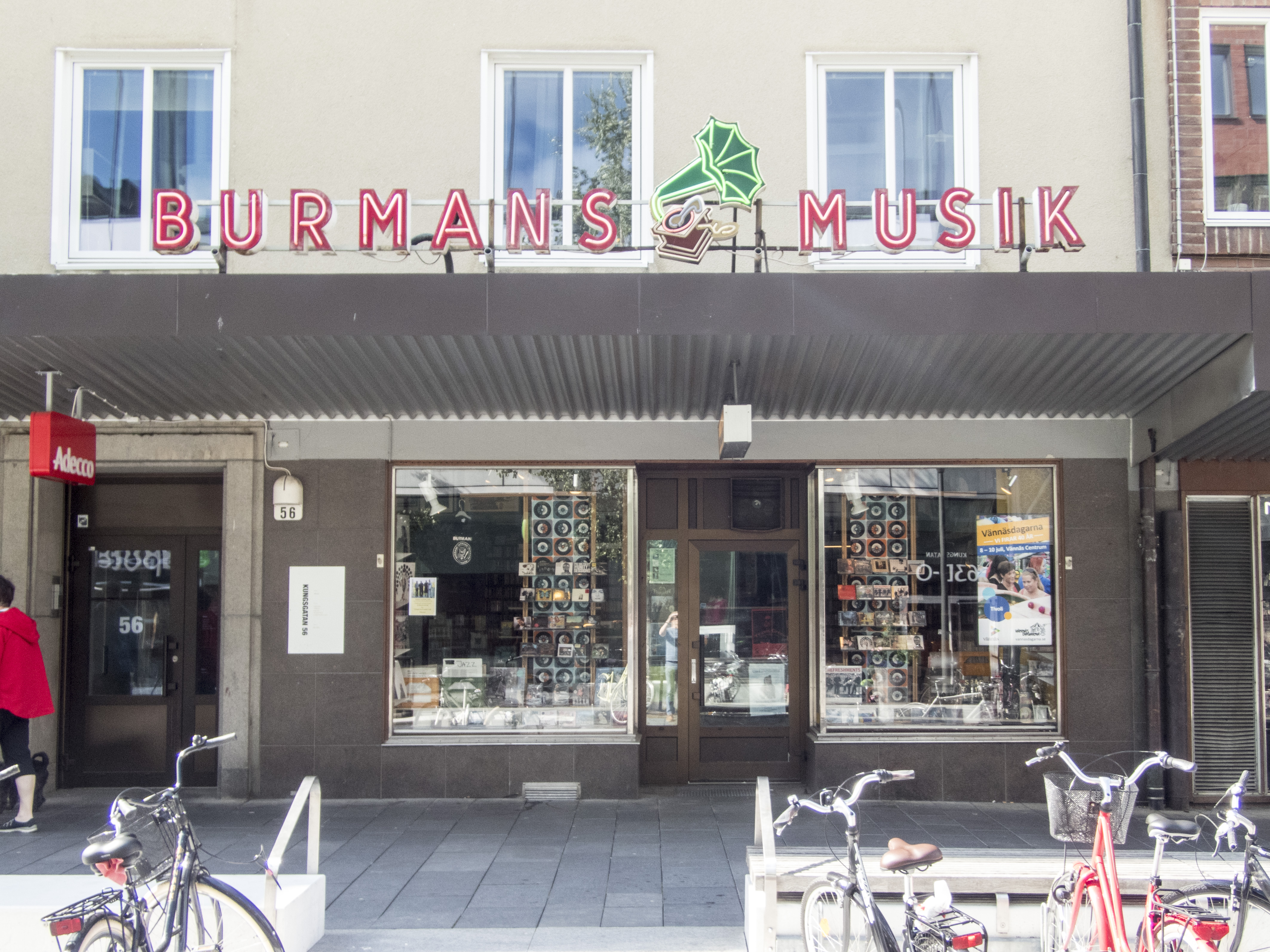 Burmans musik, Umeå. Skivbutik öppnad 1949